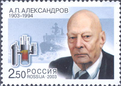 Почтовая марка России. На марке изображен портрет Анатолия Петровича Александрова, атомоход «Арктика», реактор атомного ледокола. Художник — Хания Бетрединова. Номер (ЦФА) — 818. Тираж — 250 тыс. экз.